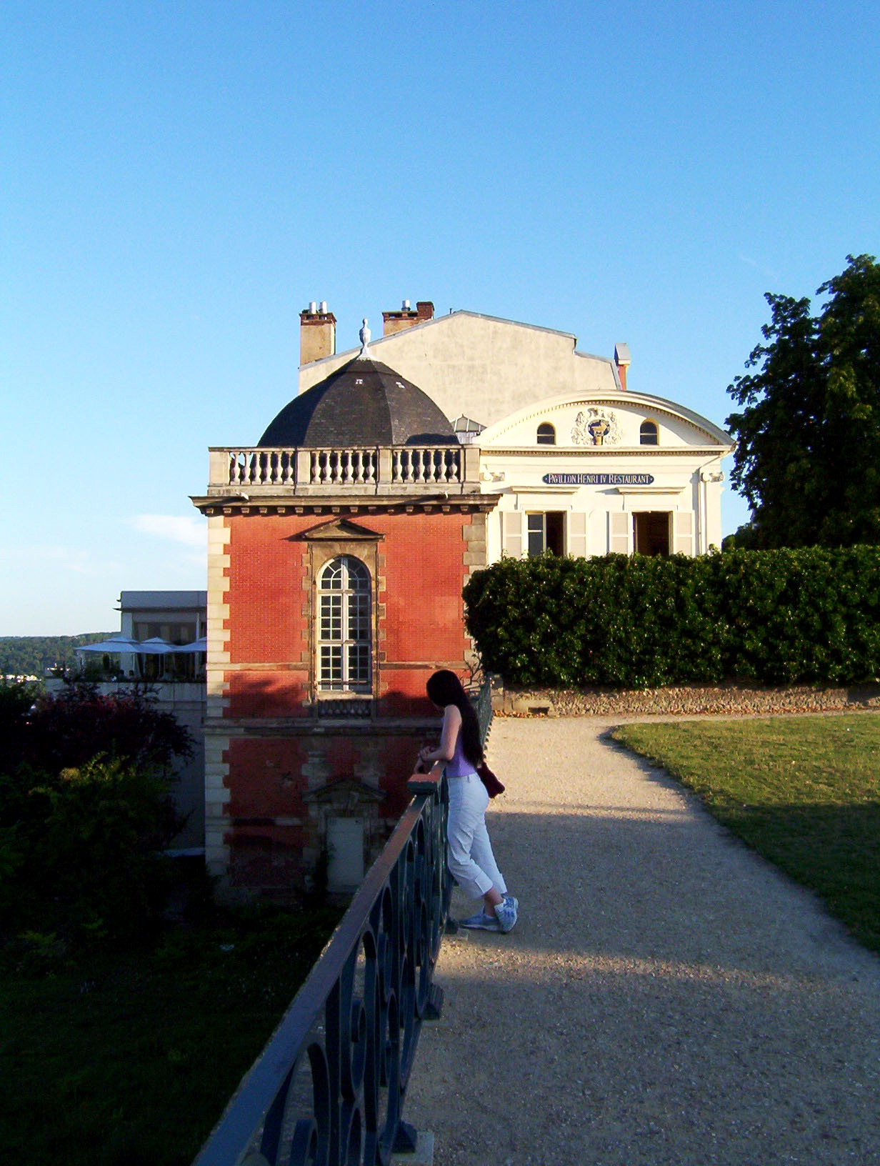 Le Pavillon Henri IV, à l'intérieur du Parc du Château